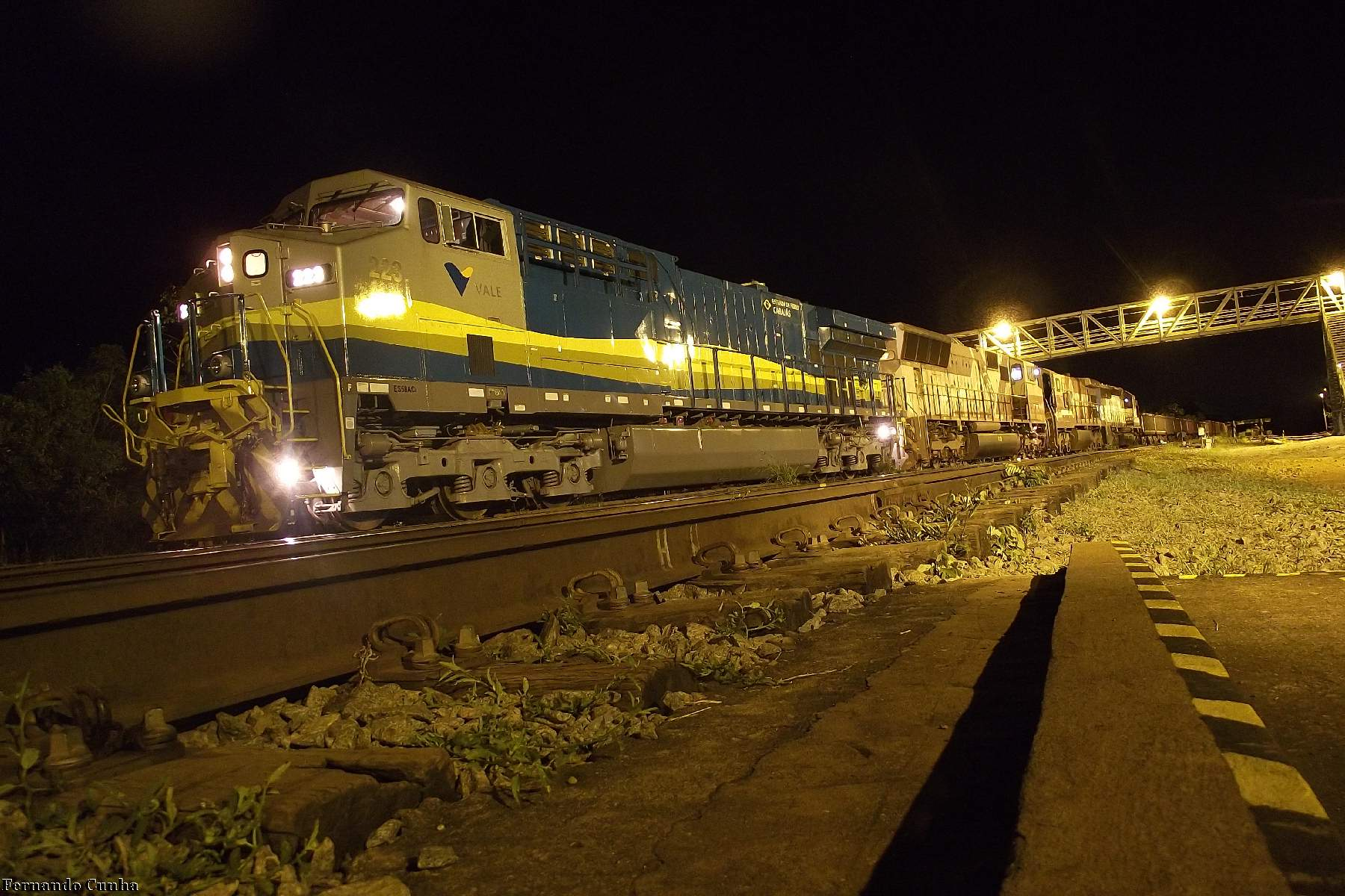 Trem cargueiro da Estrada de Ferro Carajás, Brasil.